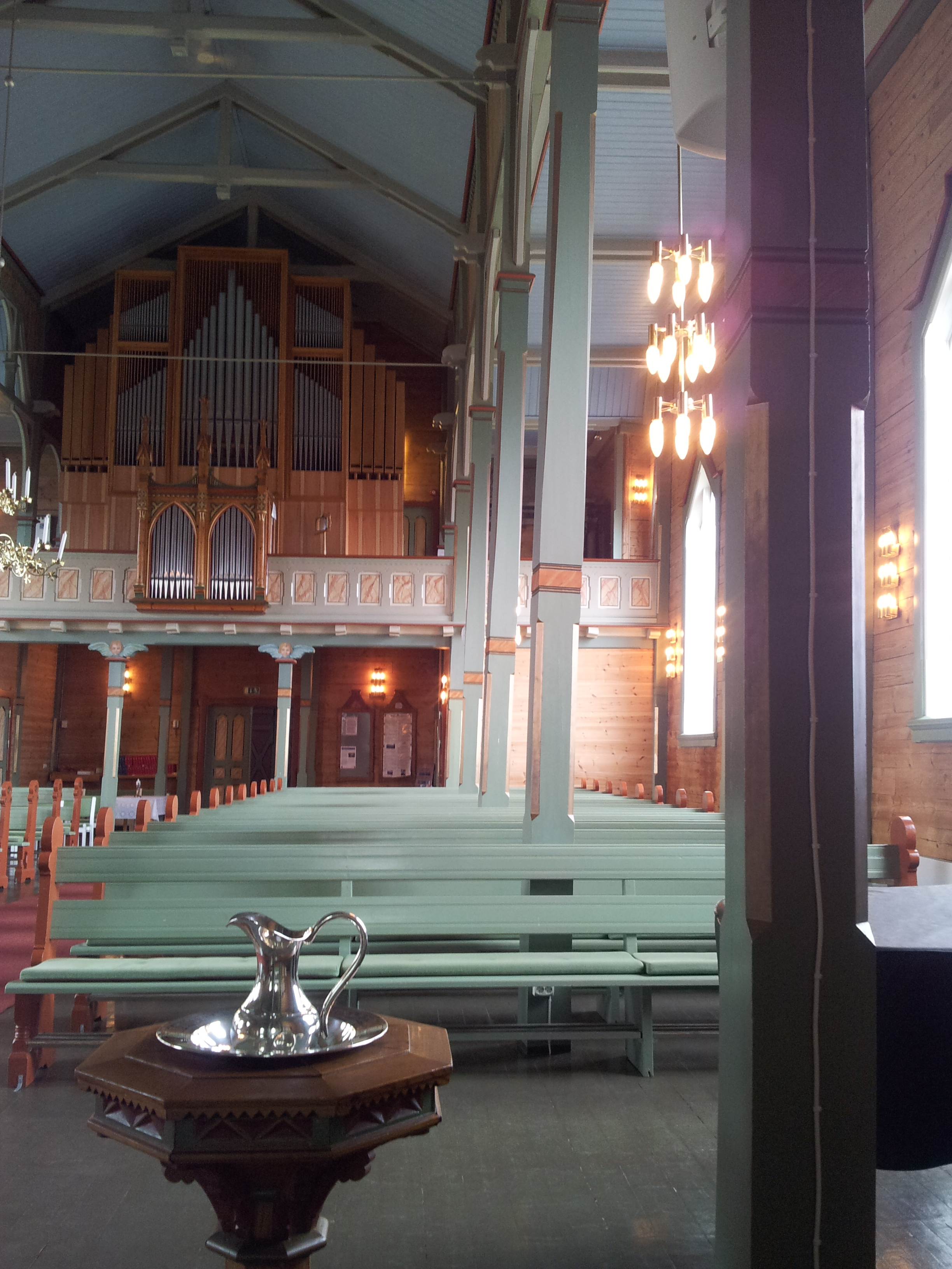 Illustrasjon som viser hvor skeiv kirken er.